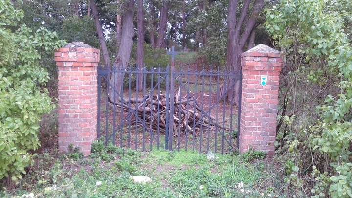 Brama od cmentarza w Borgowie